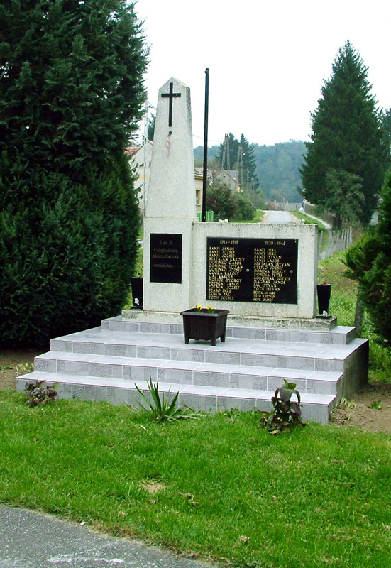 A börzöncei világháborús emlékmű